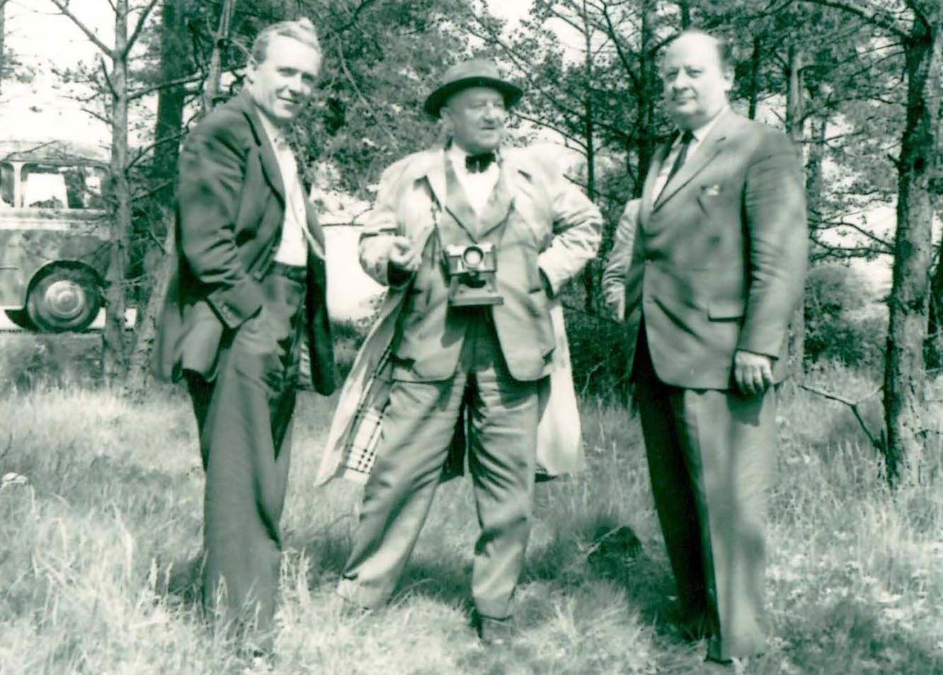 Regierungsbaudirektor Dr.-Ing. Hans Lorenz auf Dienstreise, in den 50er Jahren